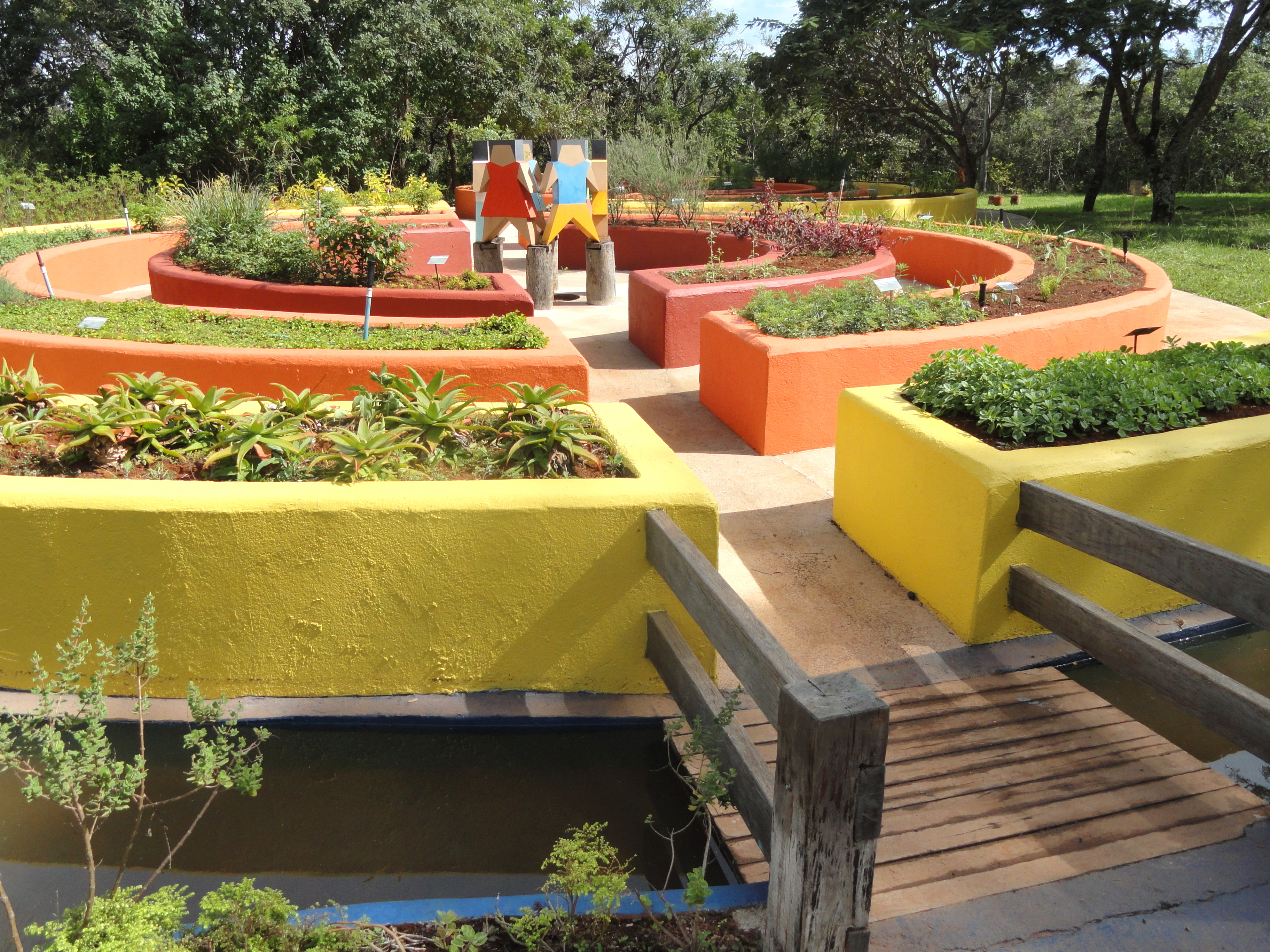 Sensorial garden in the Jardim Botânico de Brasília, Brasília, Brazil.